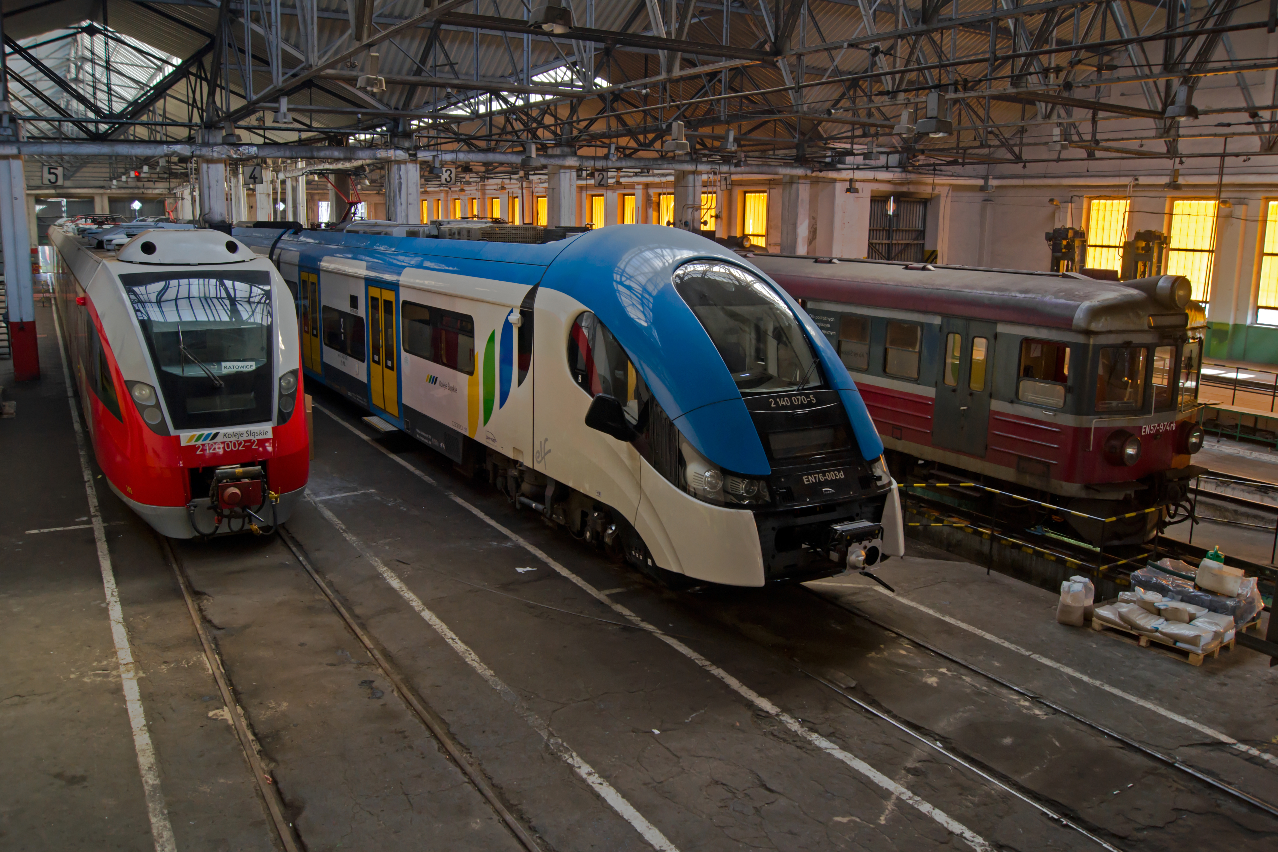 Baza spółki Koleje Śląskie w Łazach.